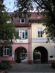 Stephanienstraße 14-16, Karlsruhe